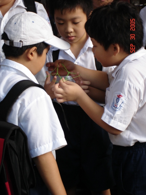 Boys in Hanoi making string figures